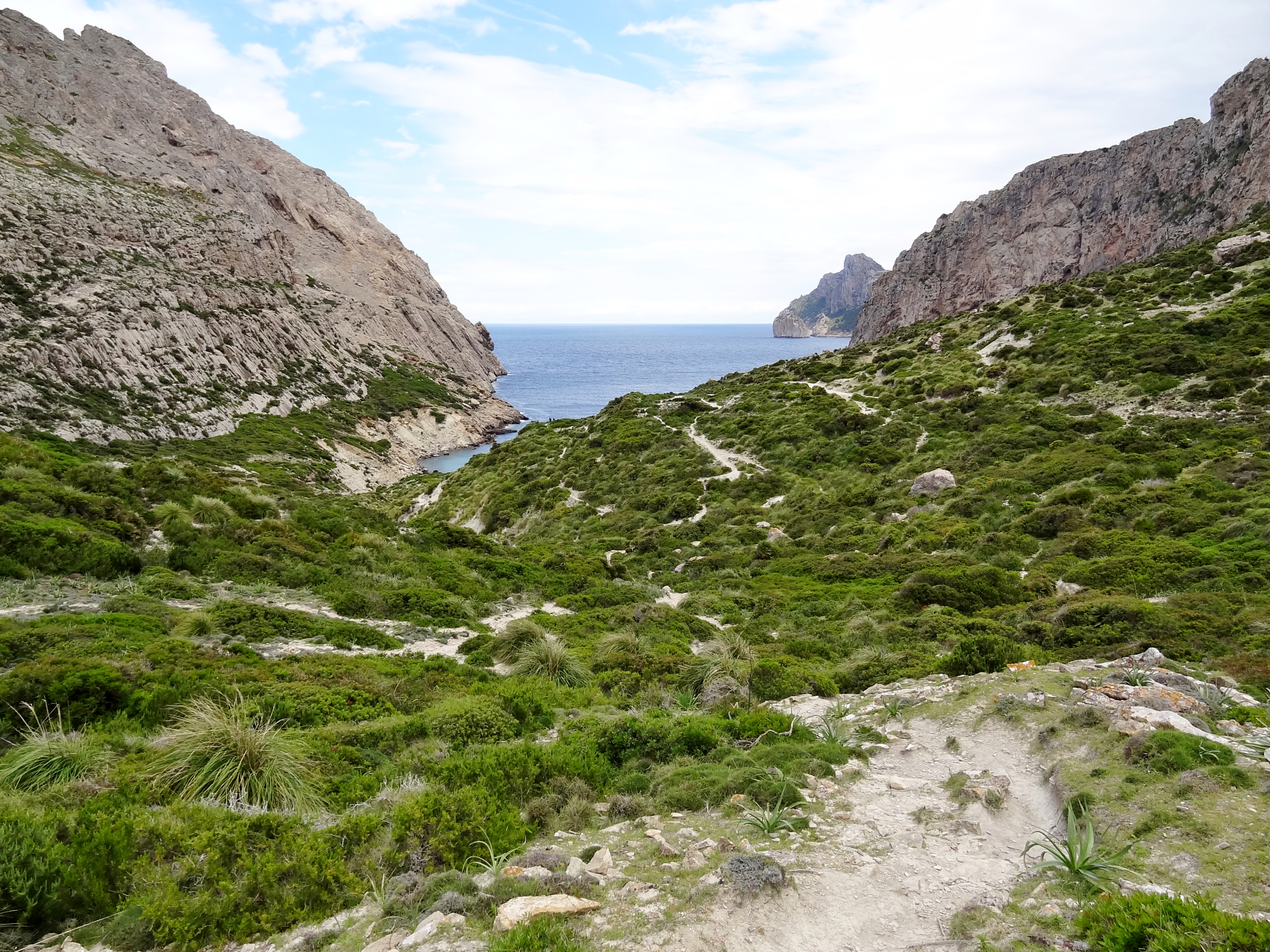 Cala Bóquer in der Gemeinde Pollença, Mallorca, Spanien